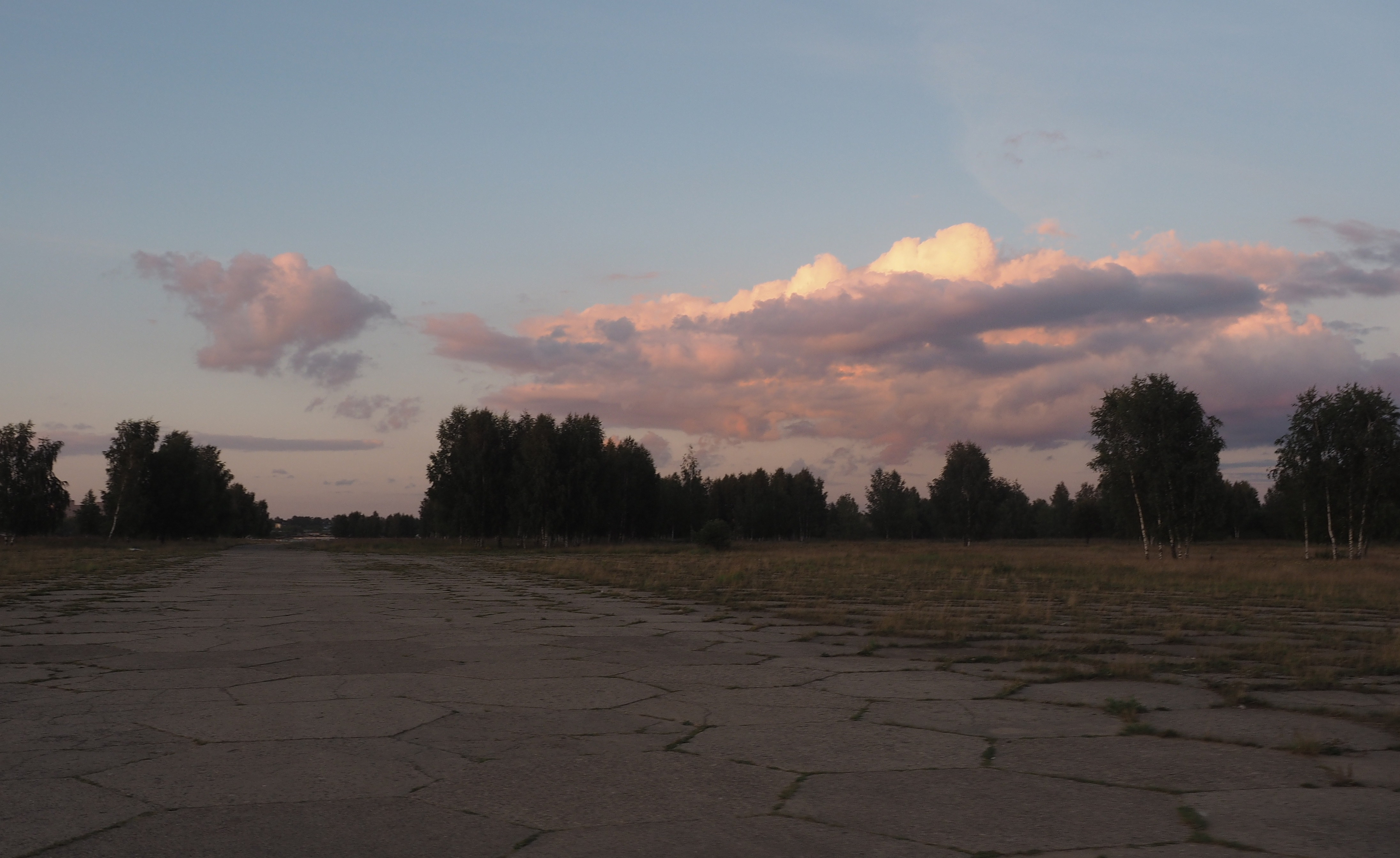 Посёлок Монино